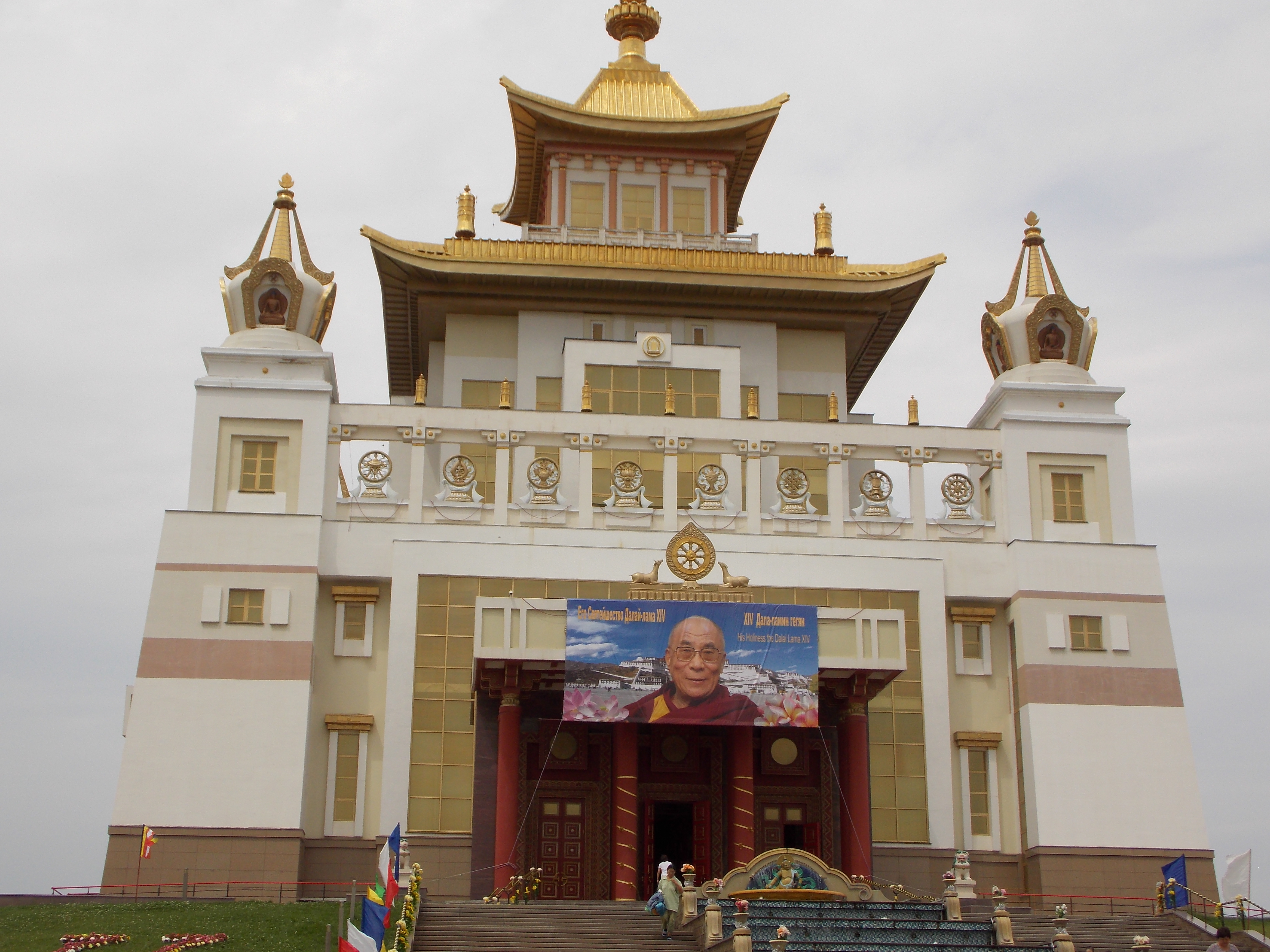 Празднование 77-летия Далай-Ламы XIV, Золотая обитель Будды Шакьямуни, Элиста, Калмыкия